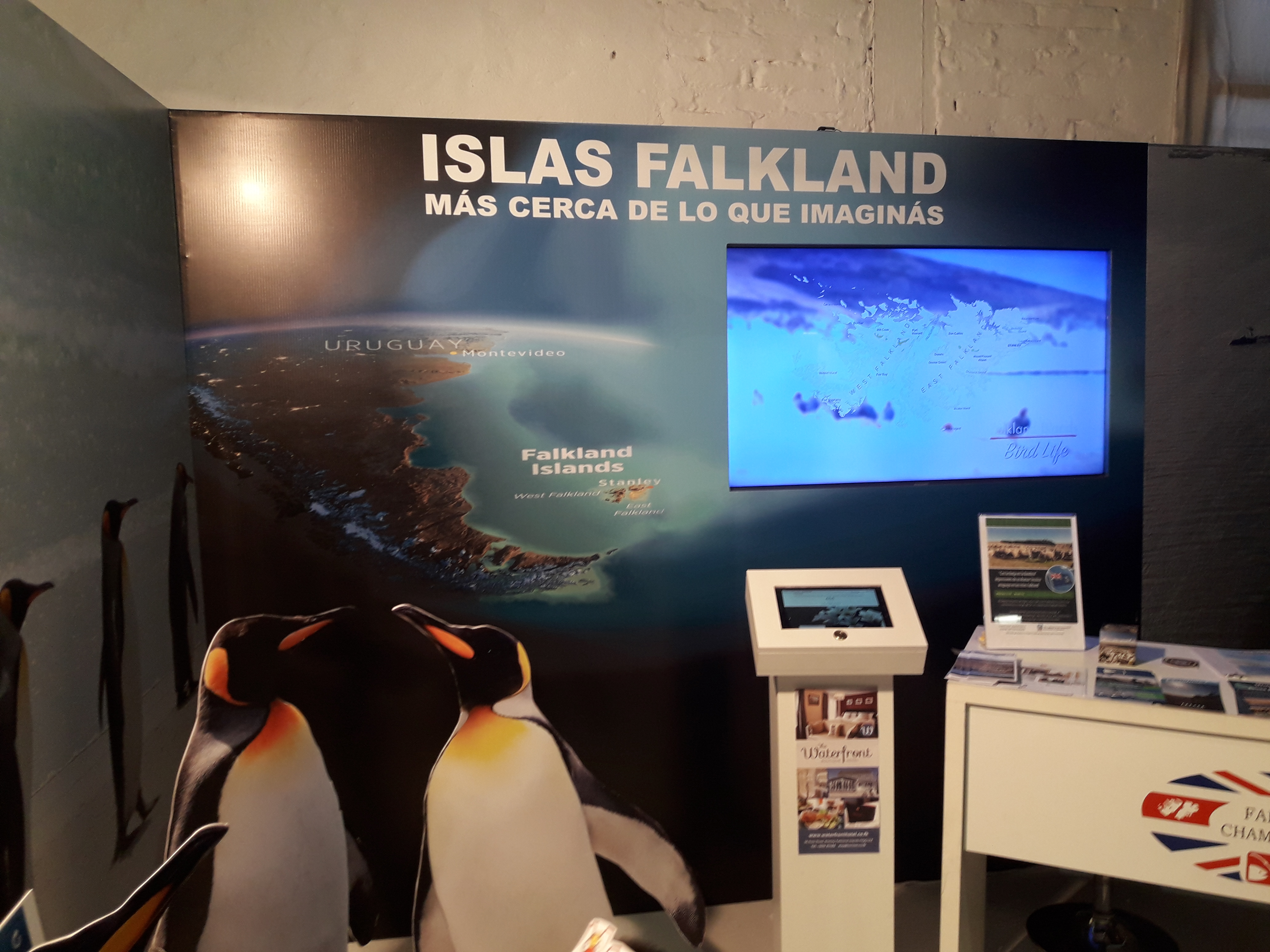 Stand turístico de las Islas Falkland, organizado por el gobierno británico, durante la Expo Prado 2018, evento que organiza la Asociación Rural del Uruguay (ARU)